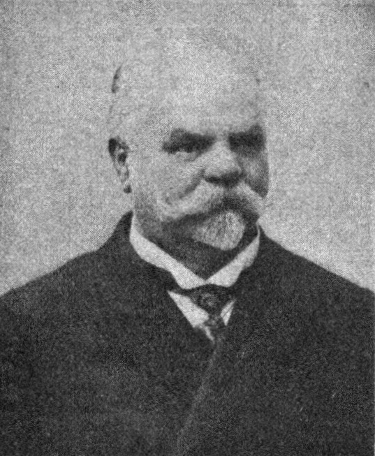 Österreichischer Politiker, Reichsratswahl 1907, Name siehe Dateiname